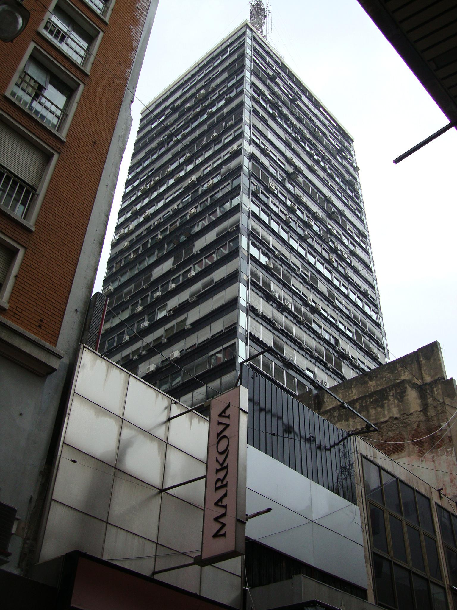 Vista de la Torre Florida de la Galería Jardín, en la calle Florida nº 559. Barrio de San Nicolás, ciudad de Buenos Aires, Argentina.